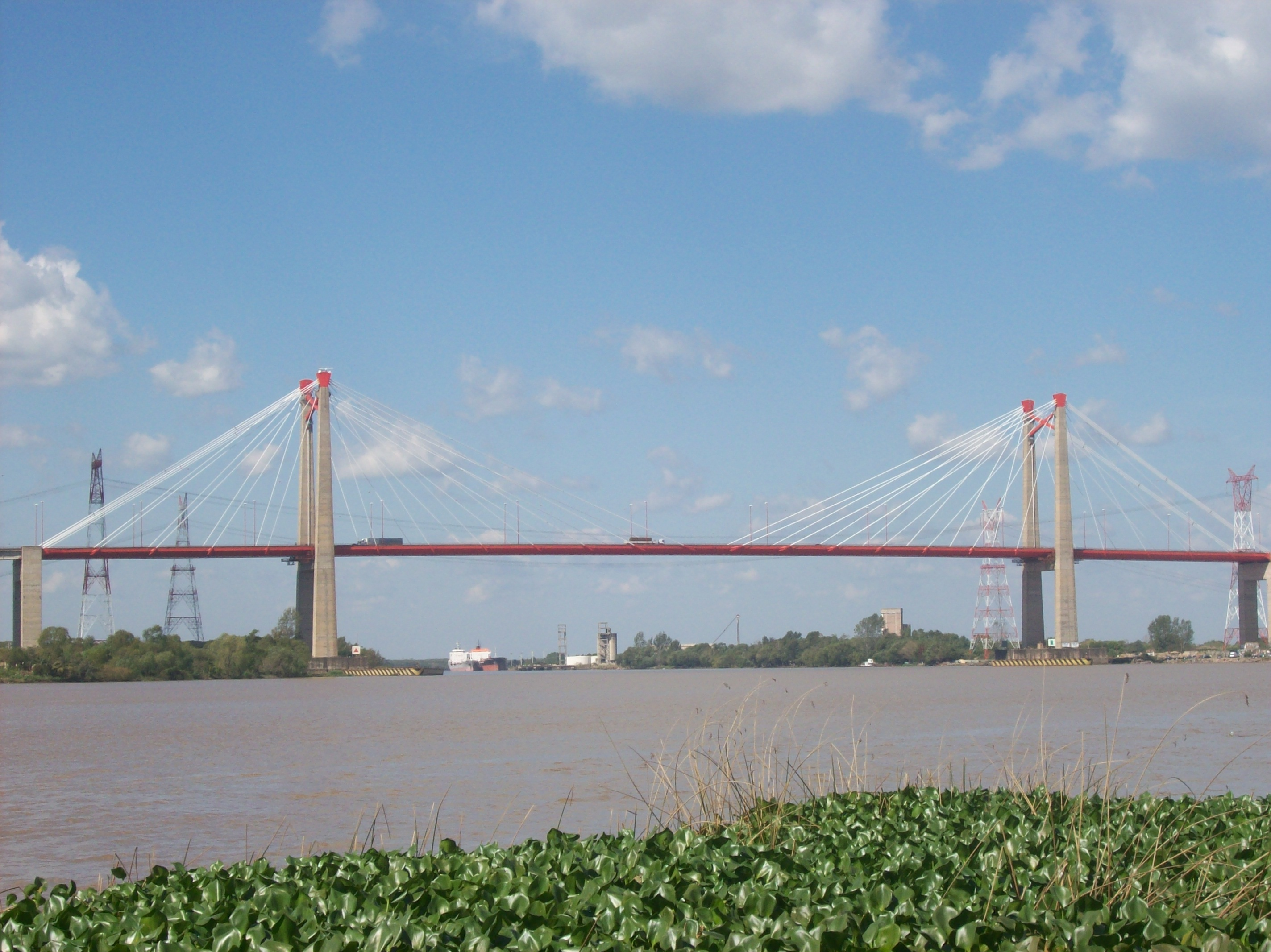 Puente Mitre sobre el Río Paraná de las Palmas desde el paseo costanero de Zárate, provincia de Buenos Aires, Argentina.